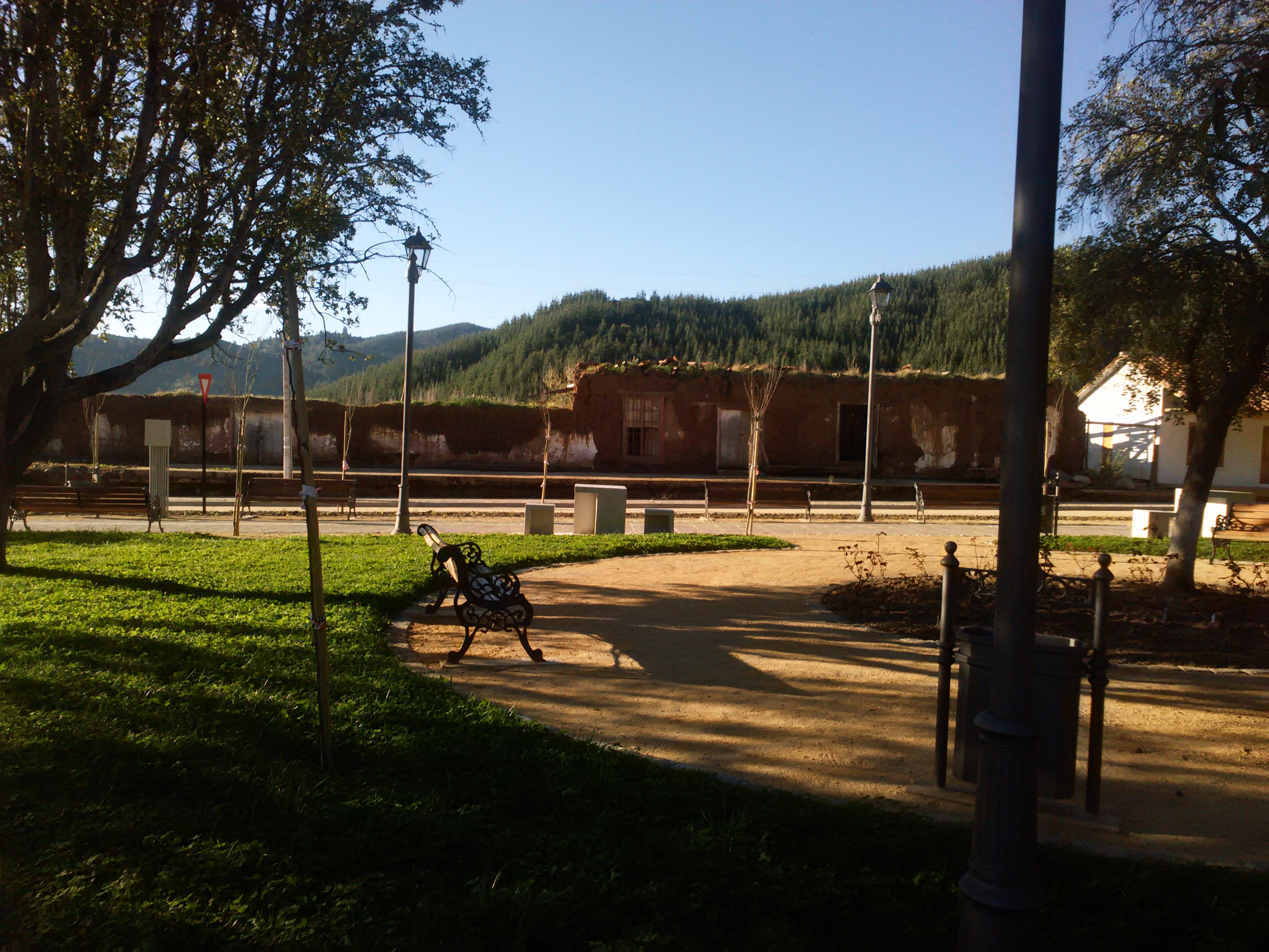 Imagen de la plaza de armas del pueblo de Huerta del Maule, VII regiòn, Chile.